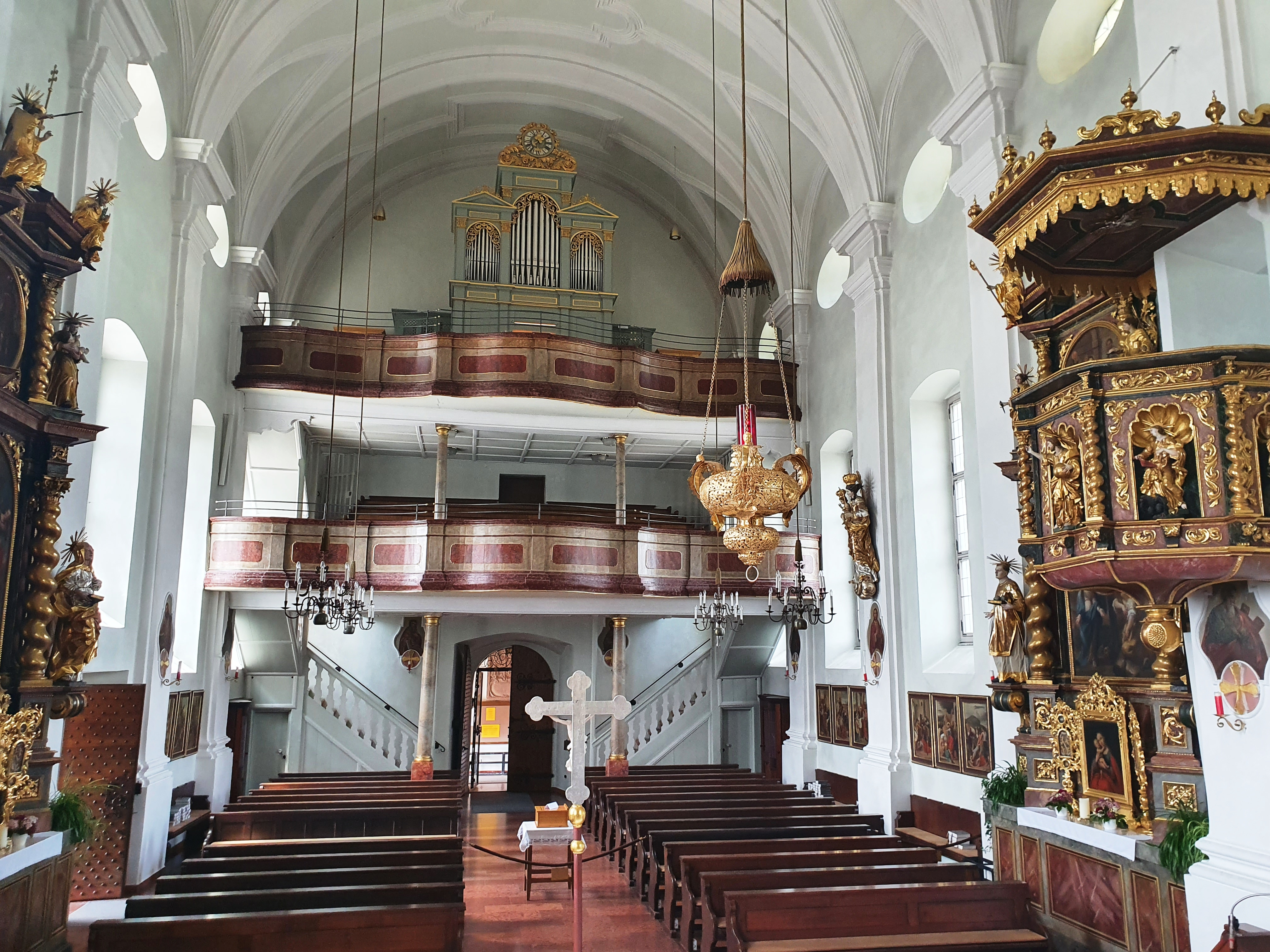 Gehäuse von Matthäus Mauracher d.Ä. 1867, Werk von Johannes Klais 2017, Bergheim